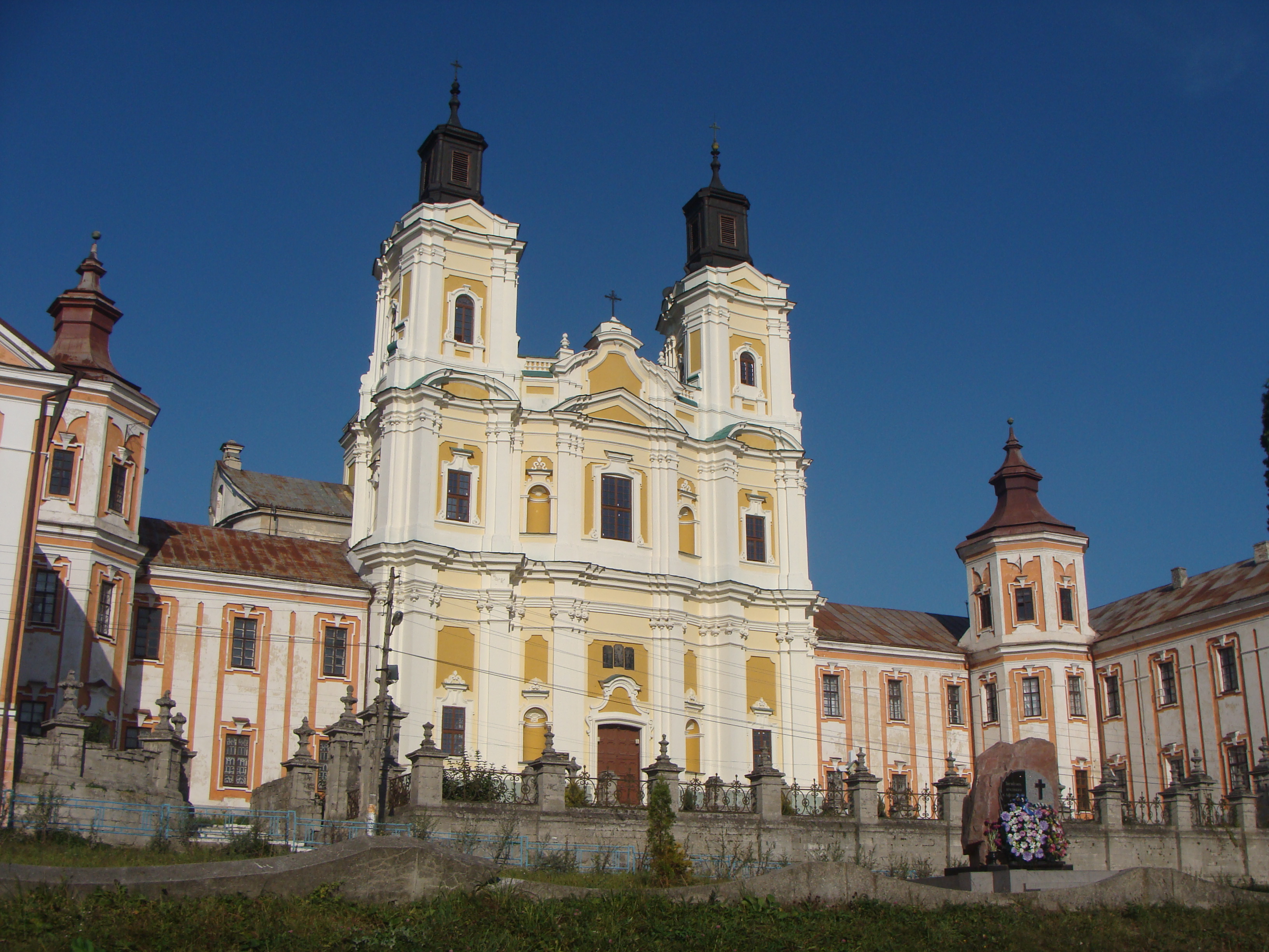 Ансамбль колегіуму - Костел Св. Ігнатія Лойоли, Кременець, вул. Ліцейна, 1